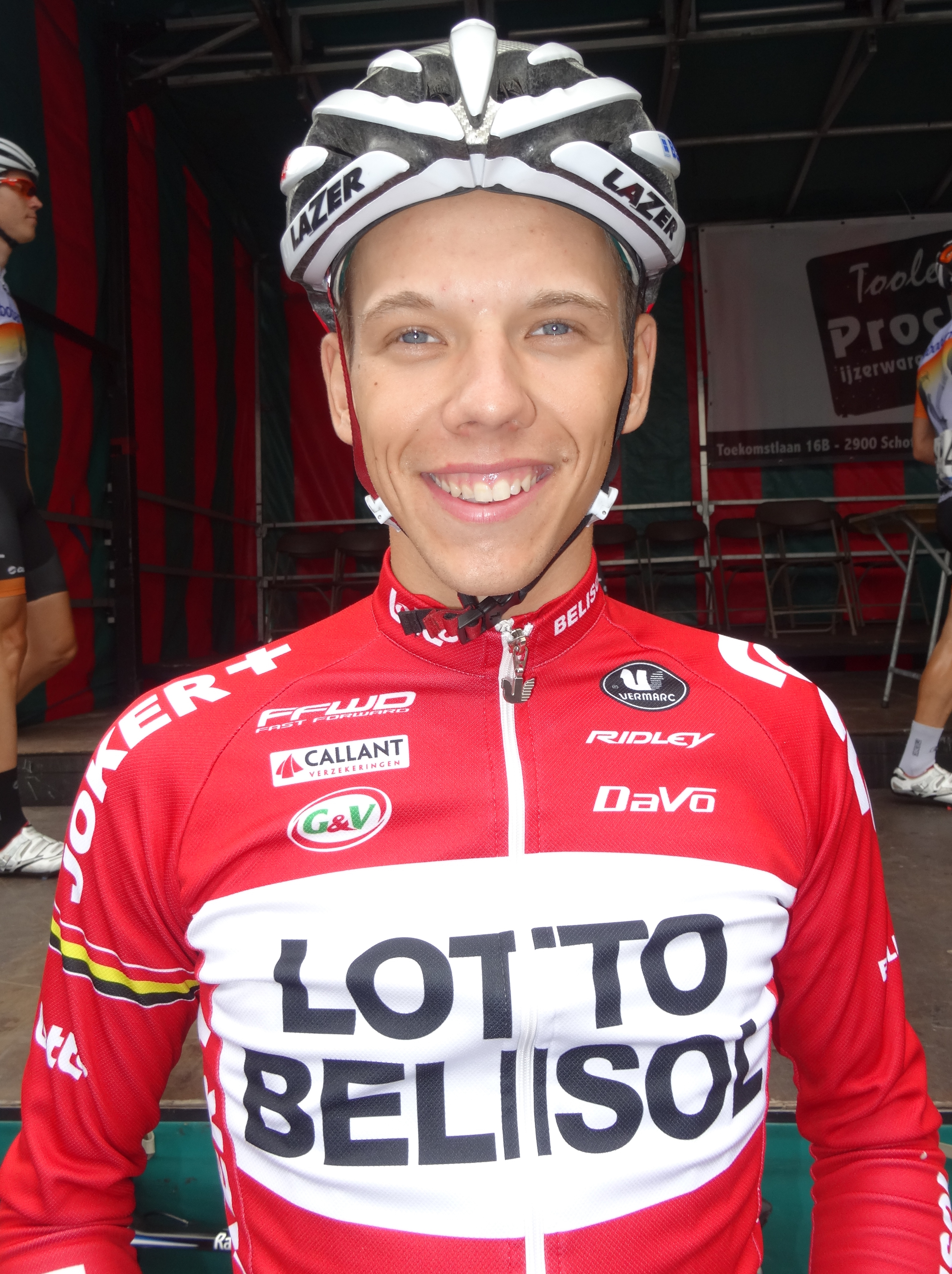 Reportage photographique réalisé le dimanche 10 août à l'occasion du départ et de l'arrivée de la Flèche du port d'Anvers 2014 à Merksem (Anvers), Belgique.